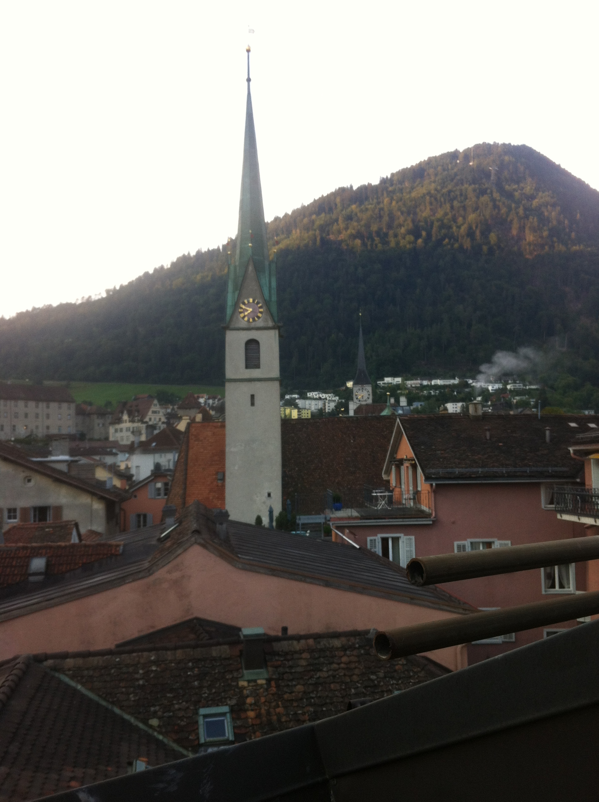 Altstadt Chur